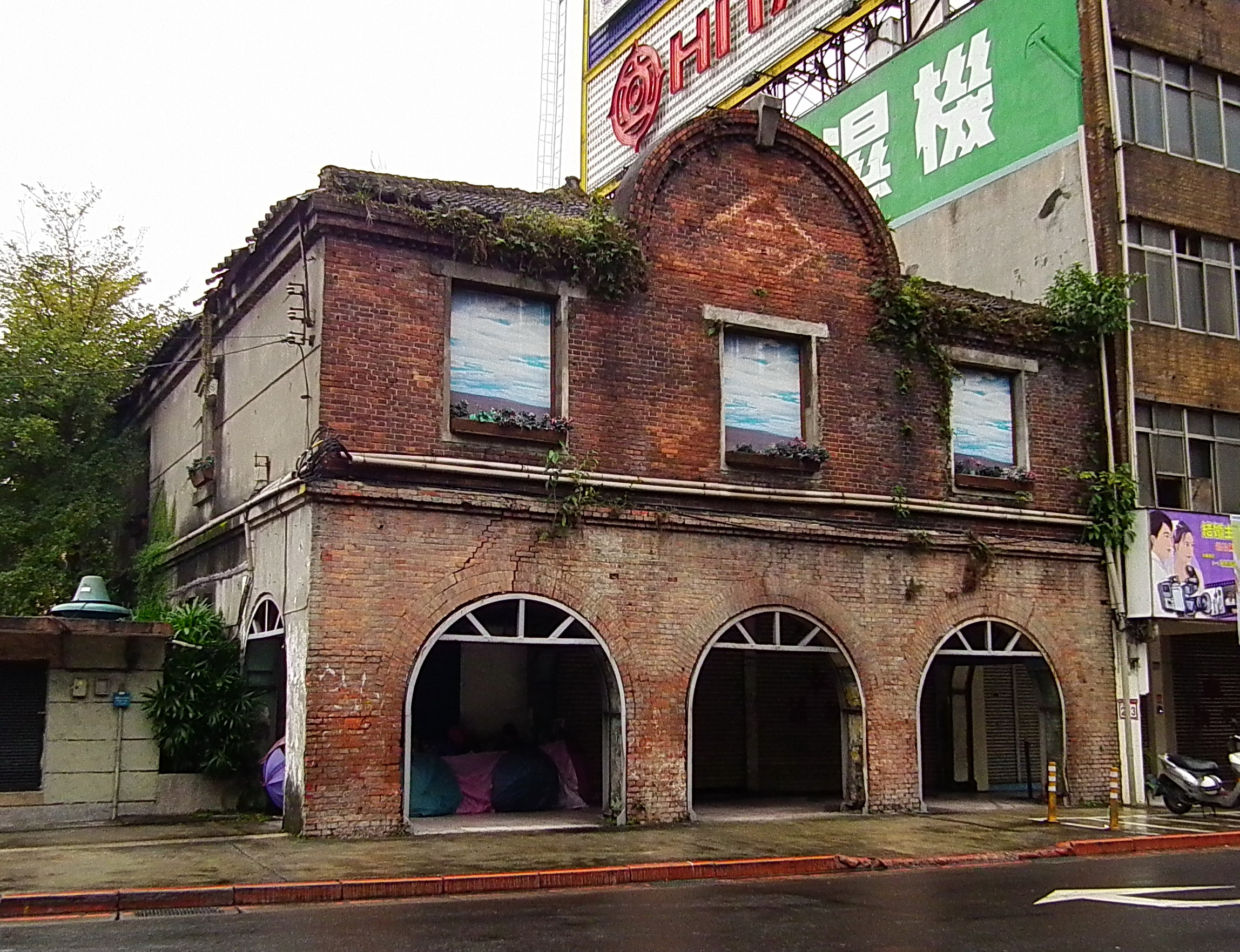 荒廢中的原三井物產臺北倉庫。